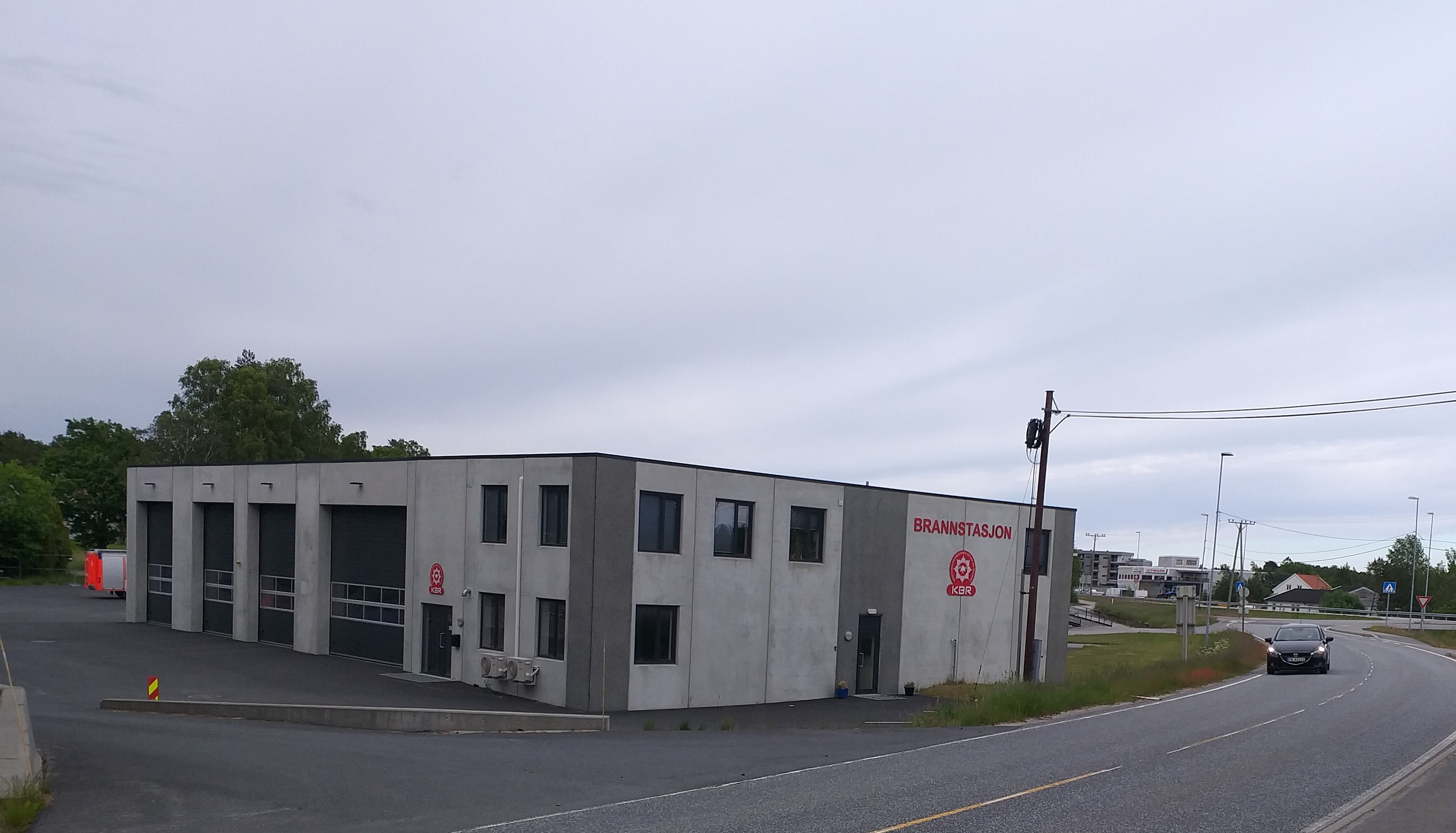 Brannstasjonen i Lillesand